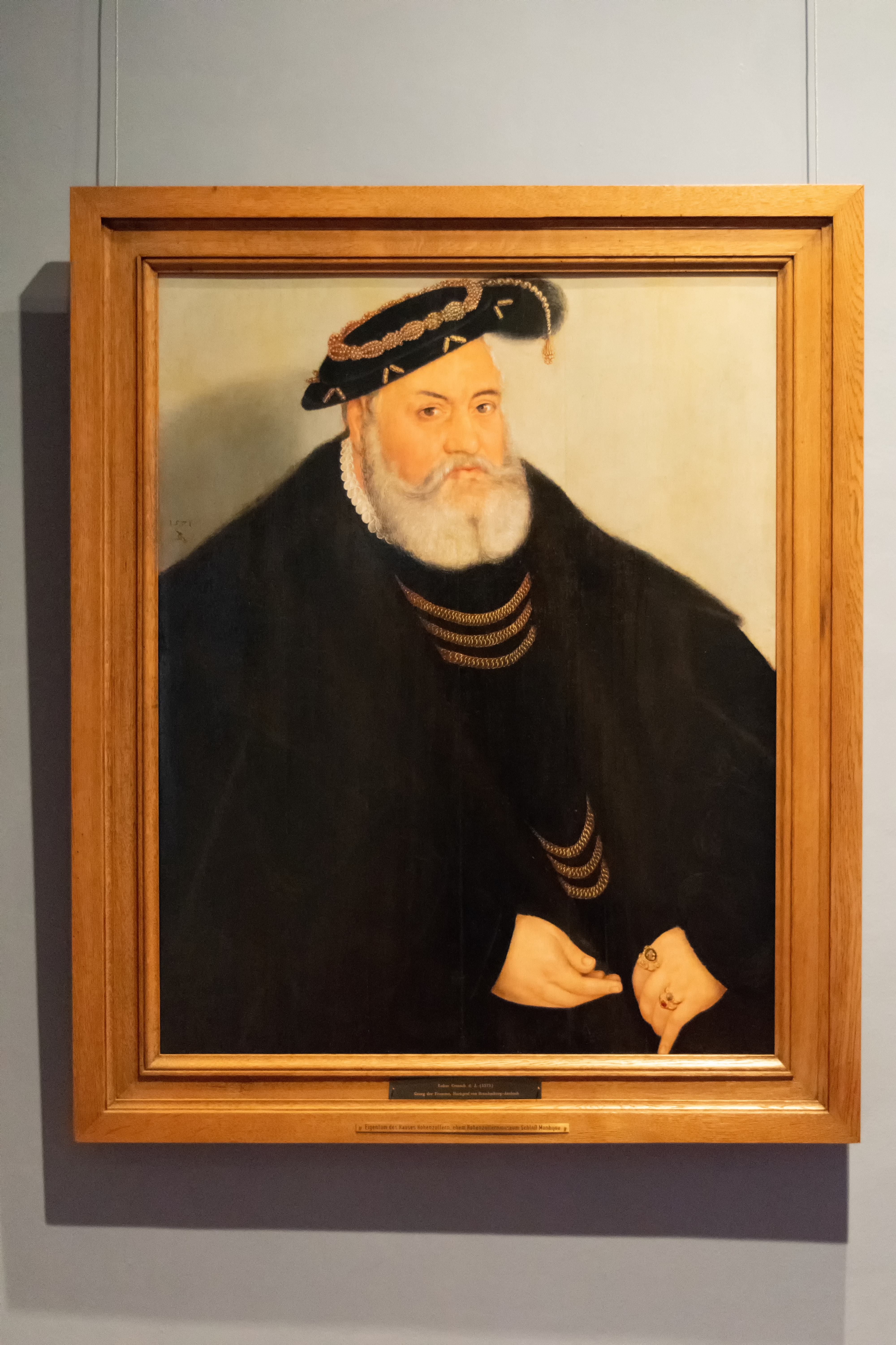 Glam on Tour Jagdschloss Grunewald, Berlin